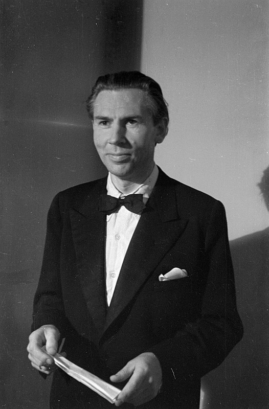 Original image description from the Deutsche Fotothek Aufnahmen von M. Friedrichs, M. Fischer, Hermann Matern, Arno Schellenberg und Frau, Frau Gret Palucca, Erich Ponto, Prof. Joseph Keilberth, Otto FalvayArno Schellenberg